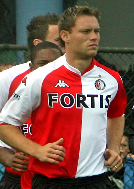 Kevin Hofland (Feyenoord)